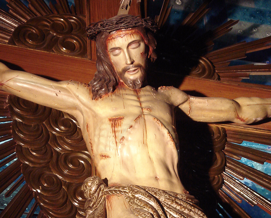 Crucifixo missioneiro